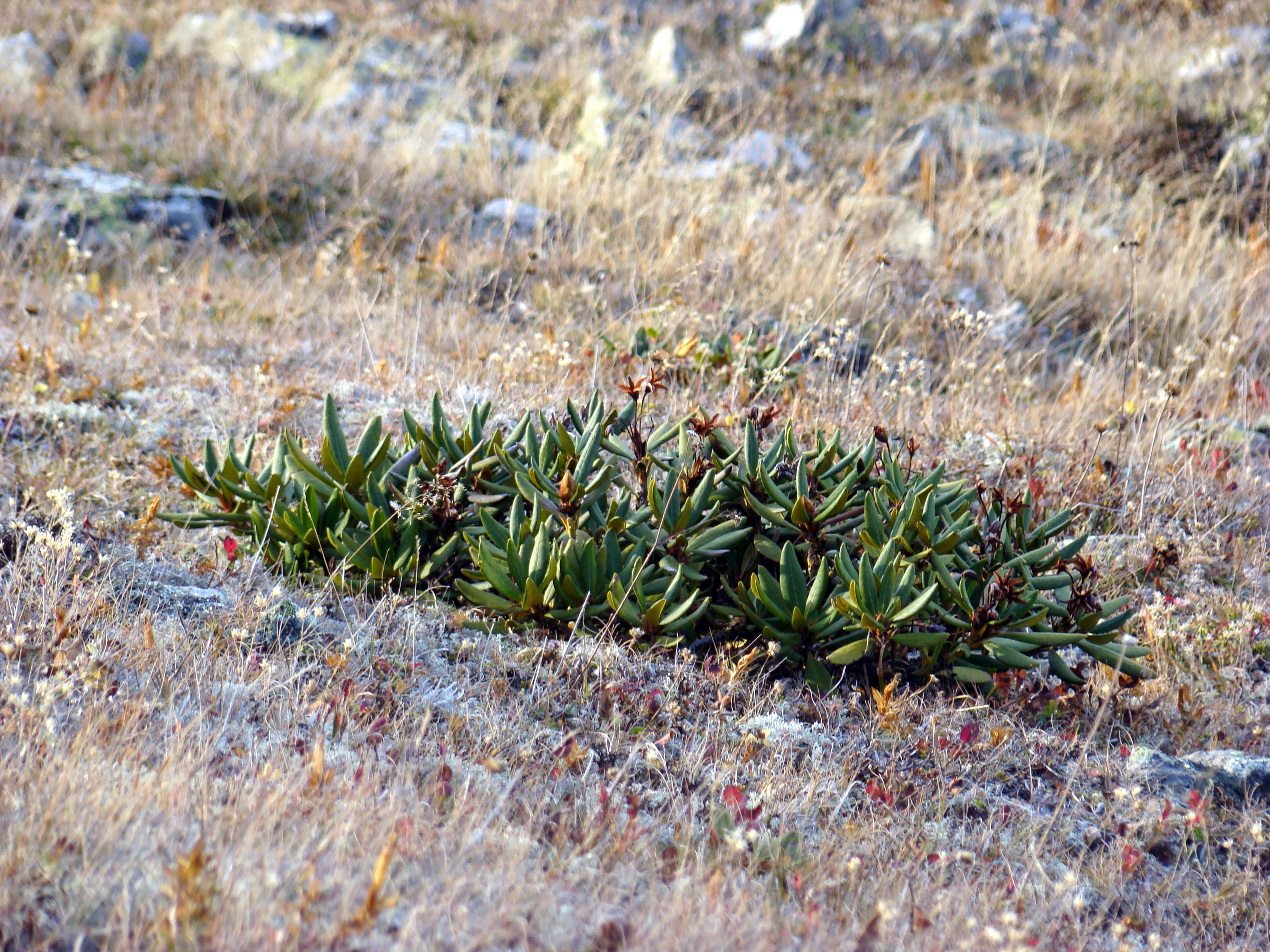 Kafkas ormangülü (Rhododendron caucasicum)